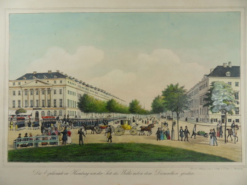 Esplanade in Hamburg vom Dammtor gesehen, Lithogr. von Peter Suhr